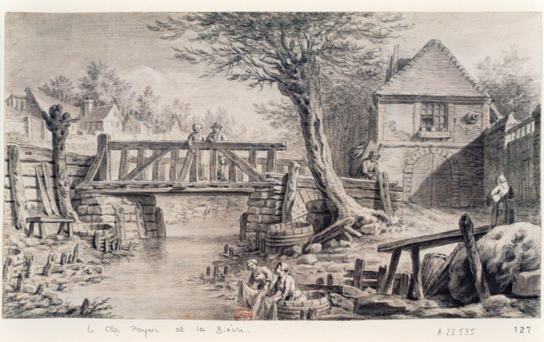 Le Clos-Payen et la Bièvre. Le Clos-Payen, maison d'un certain sieur Payen, se situait rue du Champ-de-l'Alouette (Pierre-Thomas-Nicolas Hurtaut, Dictionnaire historique de la Ville de Paris et de ses environs, vol. II, 1778, p. 357).